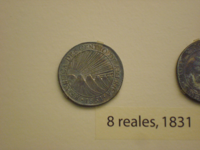 Moneda de 8 reales de la República Federal de Centroamérica (1833). Museo de Numismática Jaime Solera Benett, San José de Costa Rica.